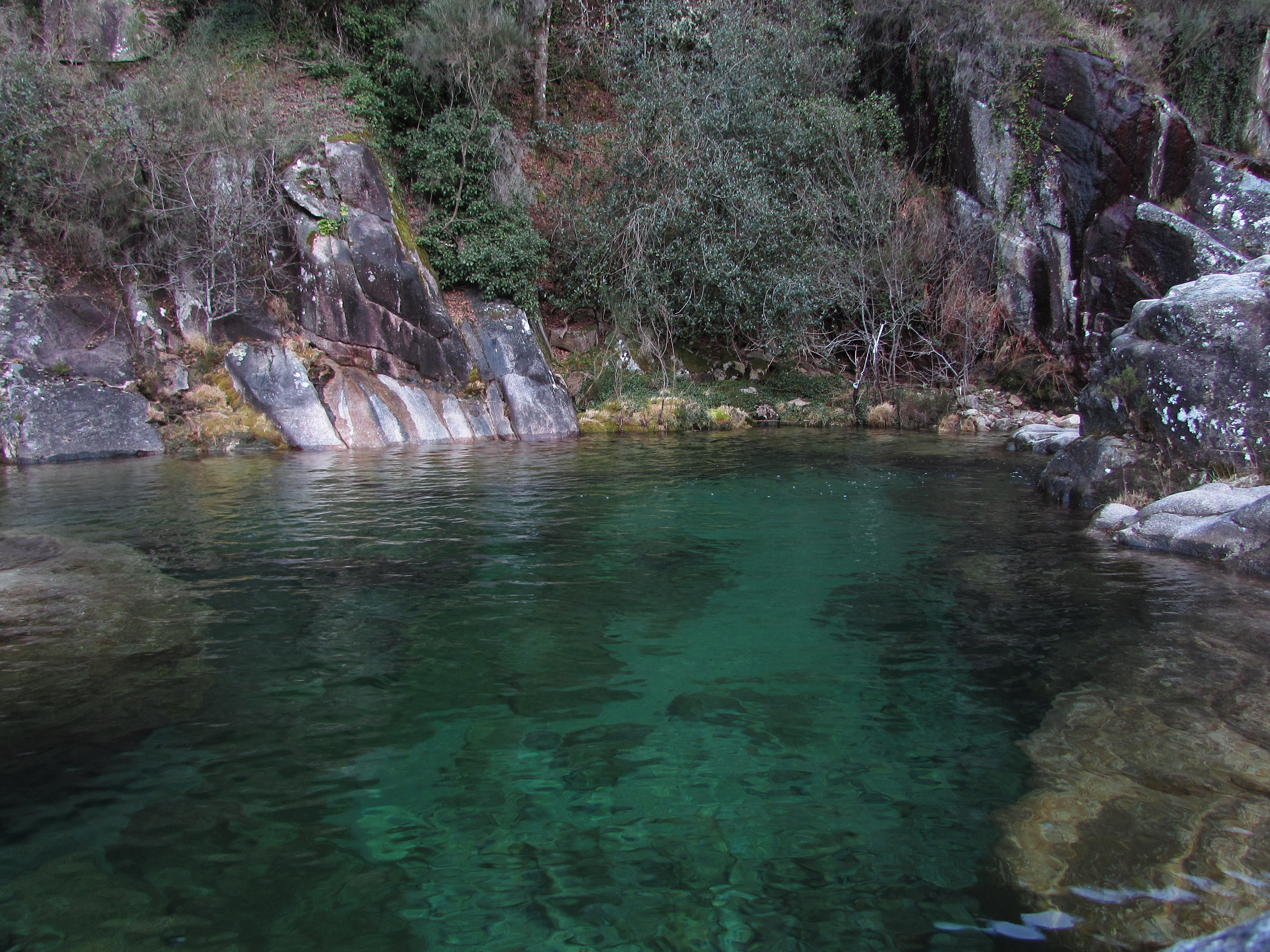 Pozo da Fecha.